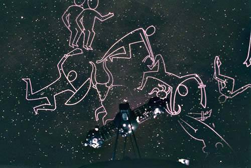 Планетариум ВВМУ проекционен проектор RFP-DP 2